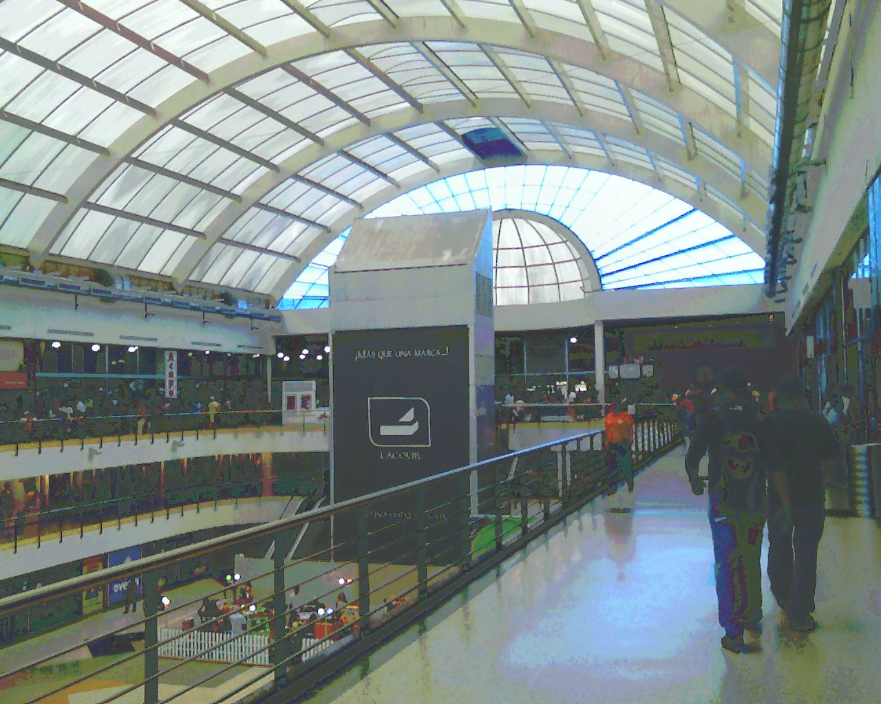 Caminado en el centro comercial Maracay edo. Aragua